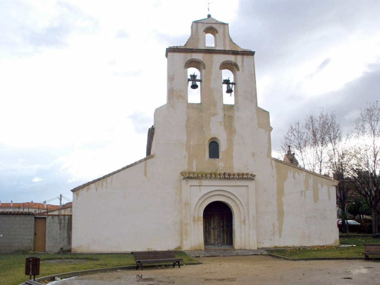 Avila - Ermita de Nuestra Señora de la Cabeza